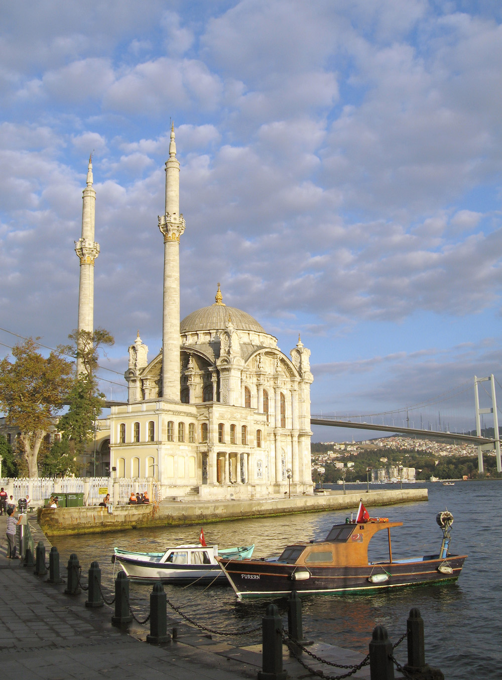 Ortaköy Camii